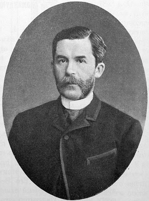 Дурново, Пётр Николаевич